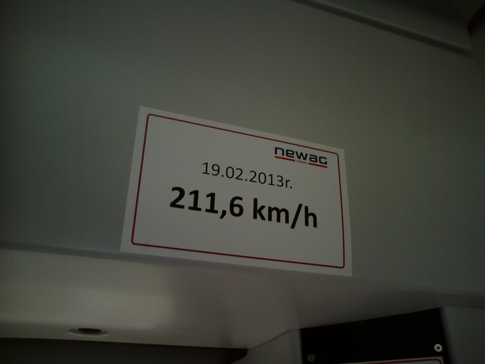 Nalepka upamiętniająca rekord prędkości składu